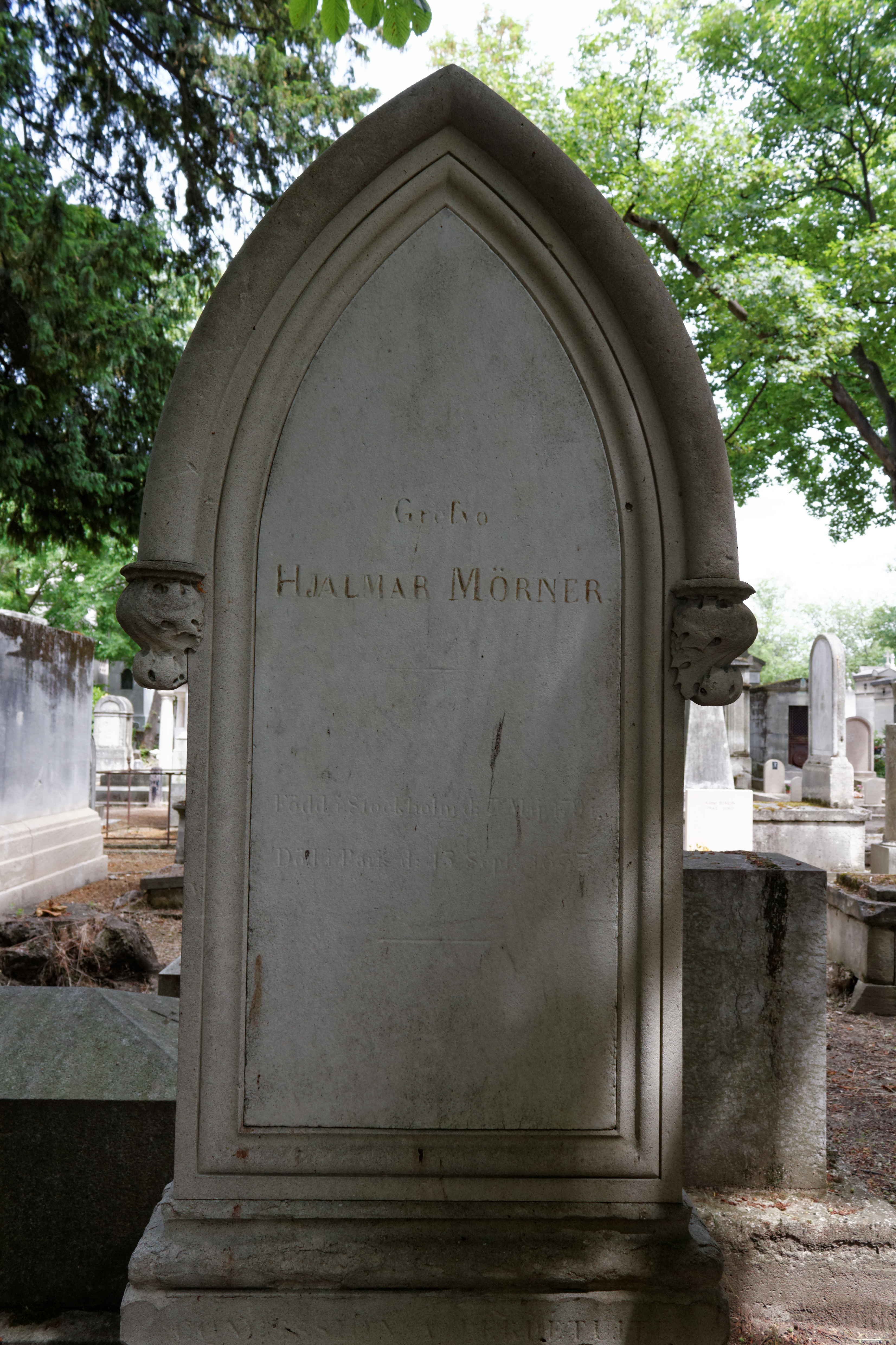 Sépulture de Hjalmar Mörner (1794-1837), peintre suédois.